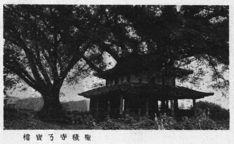 鄭璧成著四川導遊插圖